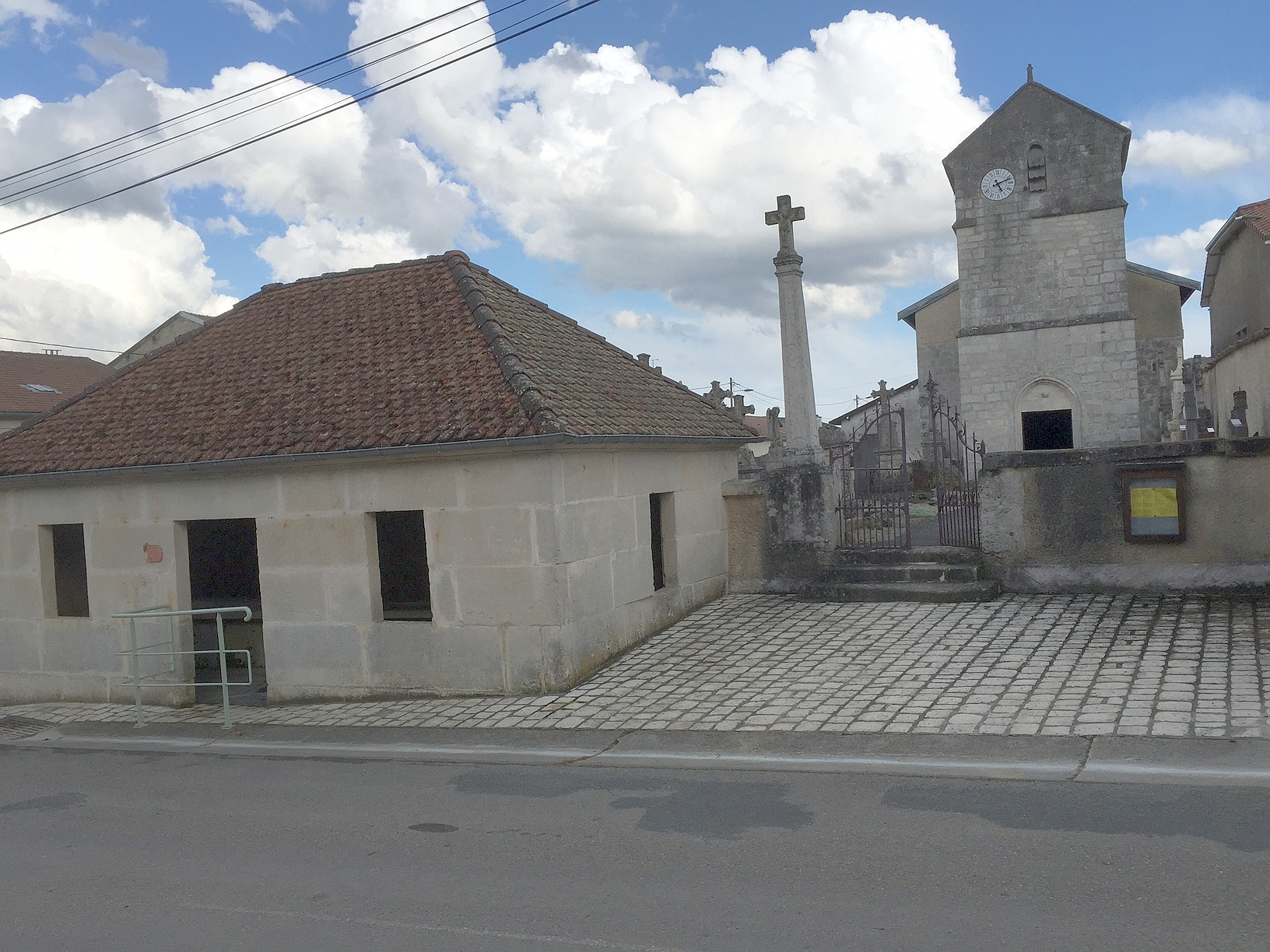 La tour de l'église date du XIIè siècle